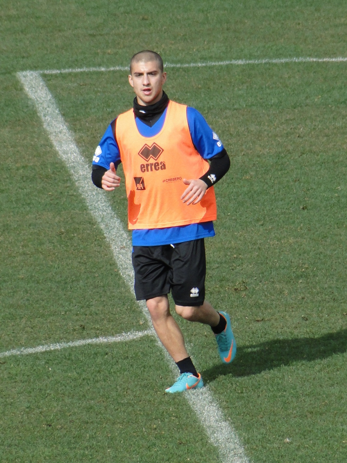 Giuseppe De Luca, calciatore italiano